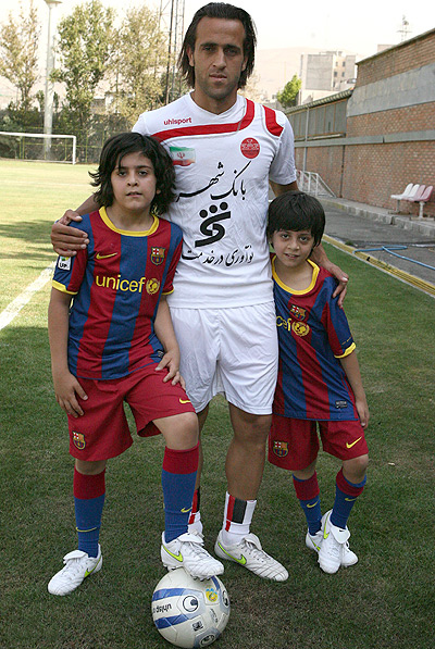 پسران علی کریمی در تمرین پرسپولیس / 21 تیر 1390